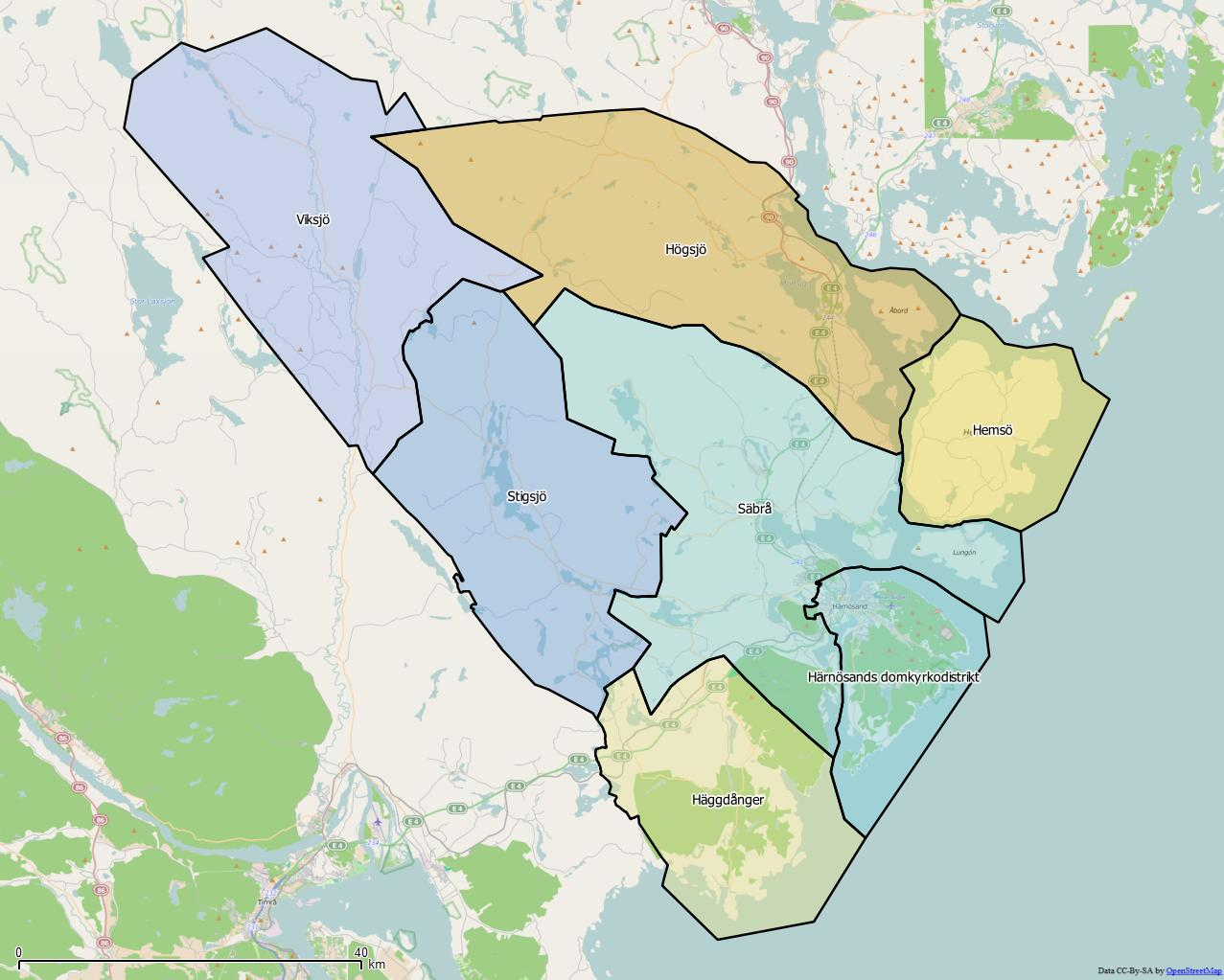 Distriktsindelningen i Härnösands kommun